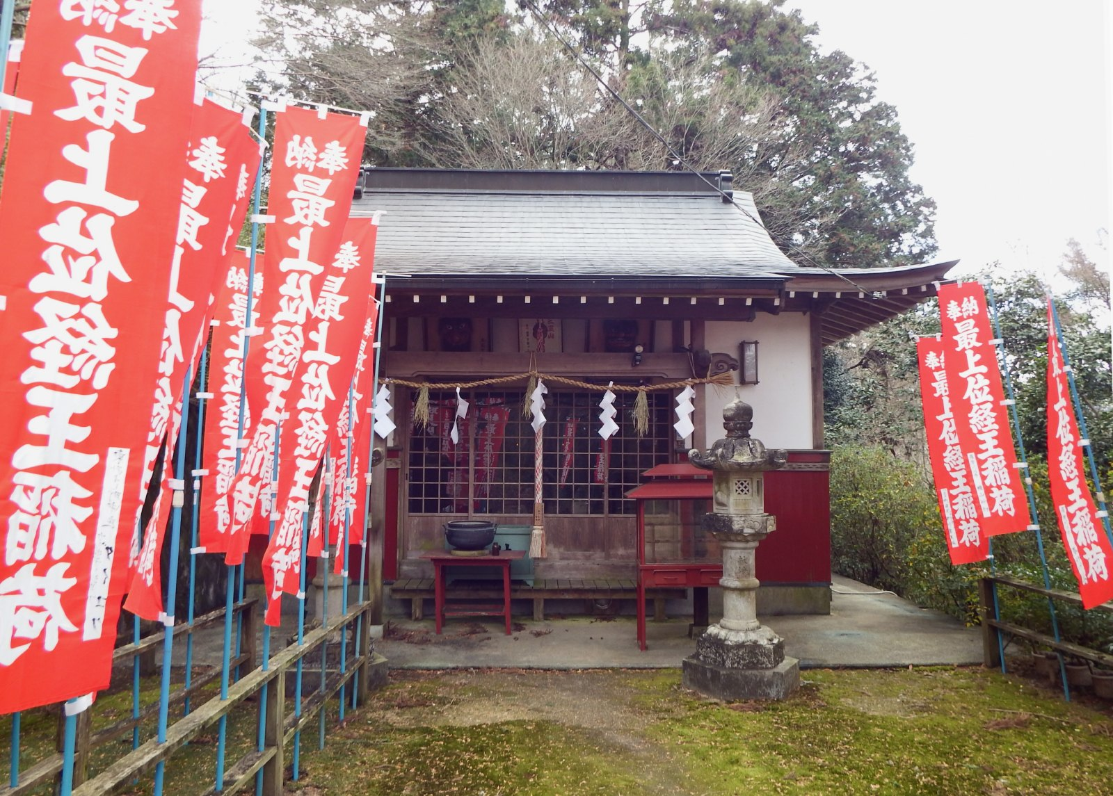 長善寺の稲荷社